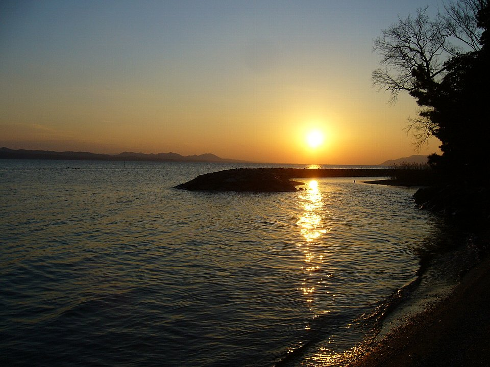 宍道湖の夕景 松江ウォーターヴィレッジから南西望